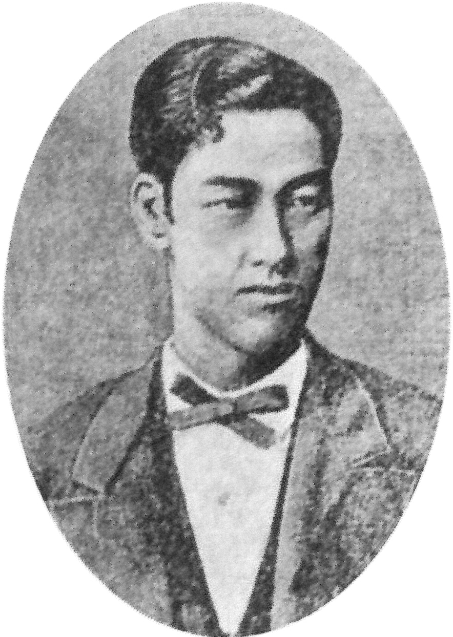 丹波亀山藩主・松平信正の肖像写真。